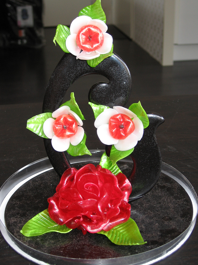 Pulled sugar roses.